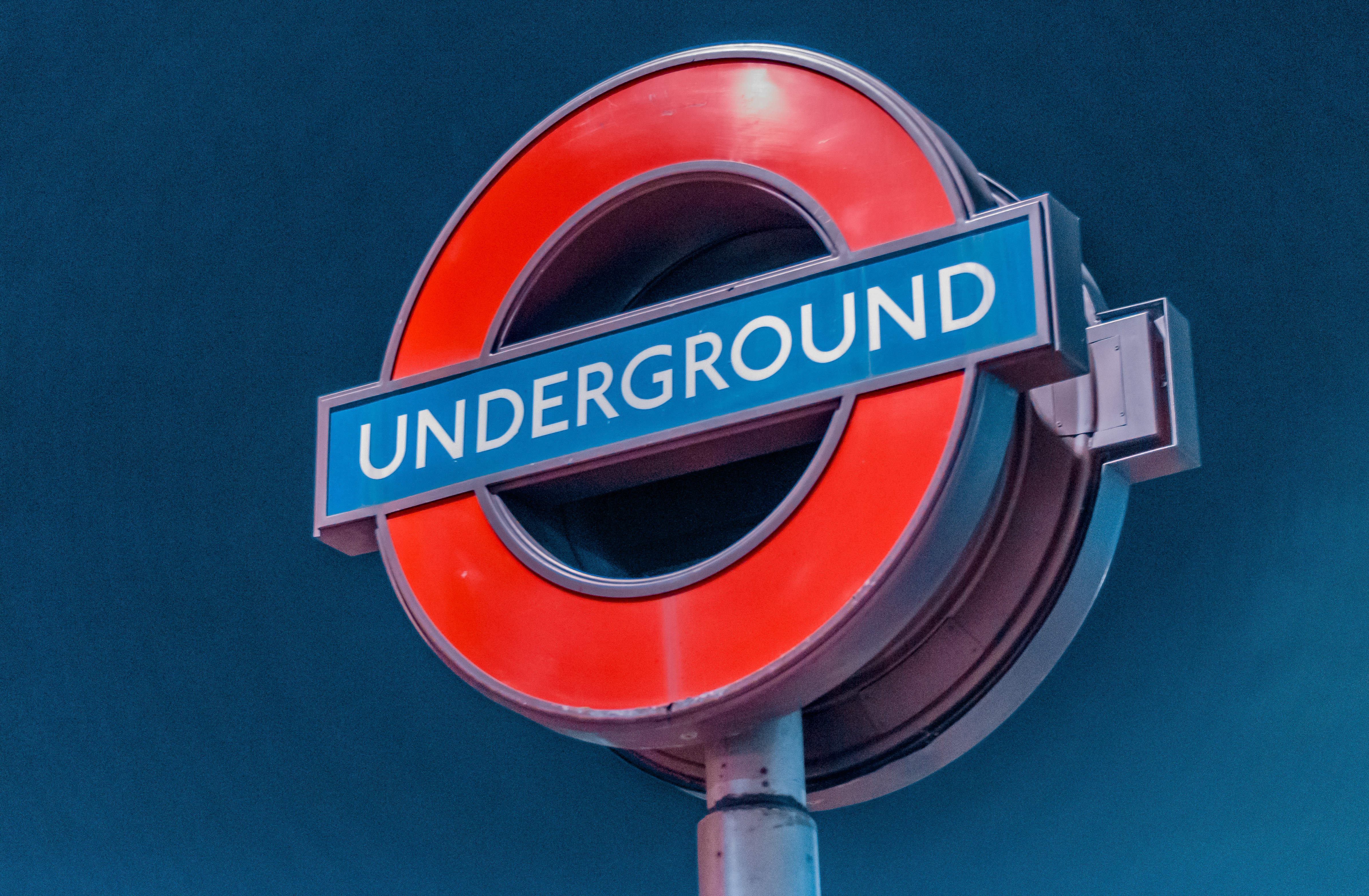 London